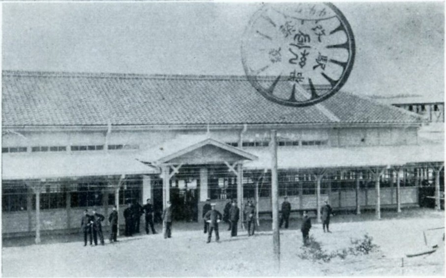 2代目綾部駅舎。出典書籍では明治44年7月、京都線開通に備え改築とある。